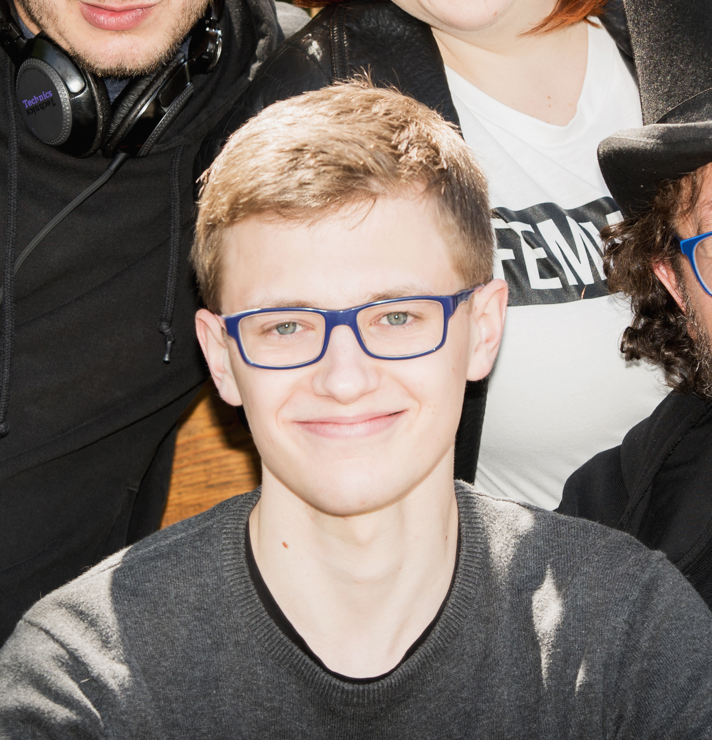 Christoph Fritz, David Scheid, Isabell Pannagl, Jimmy Schlager. Foto: Barbara Hartl